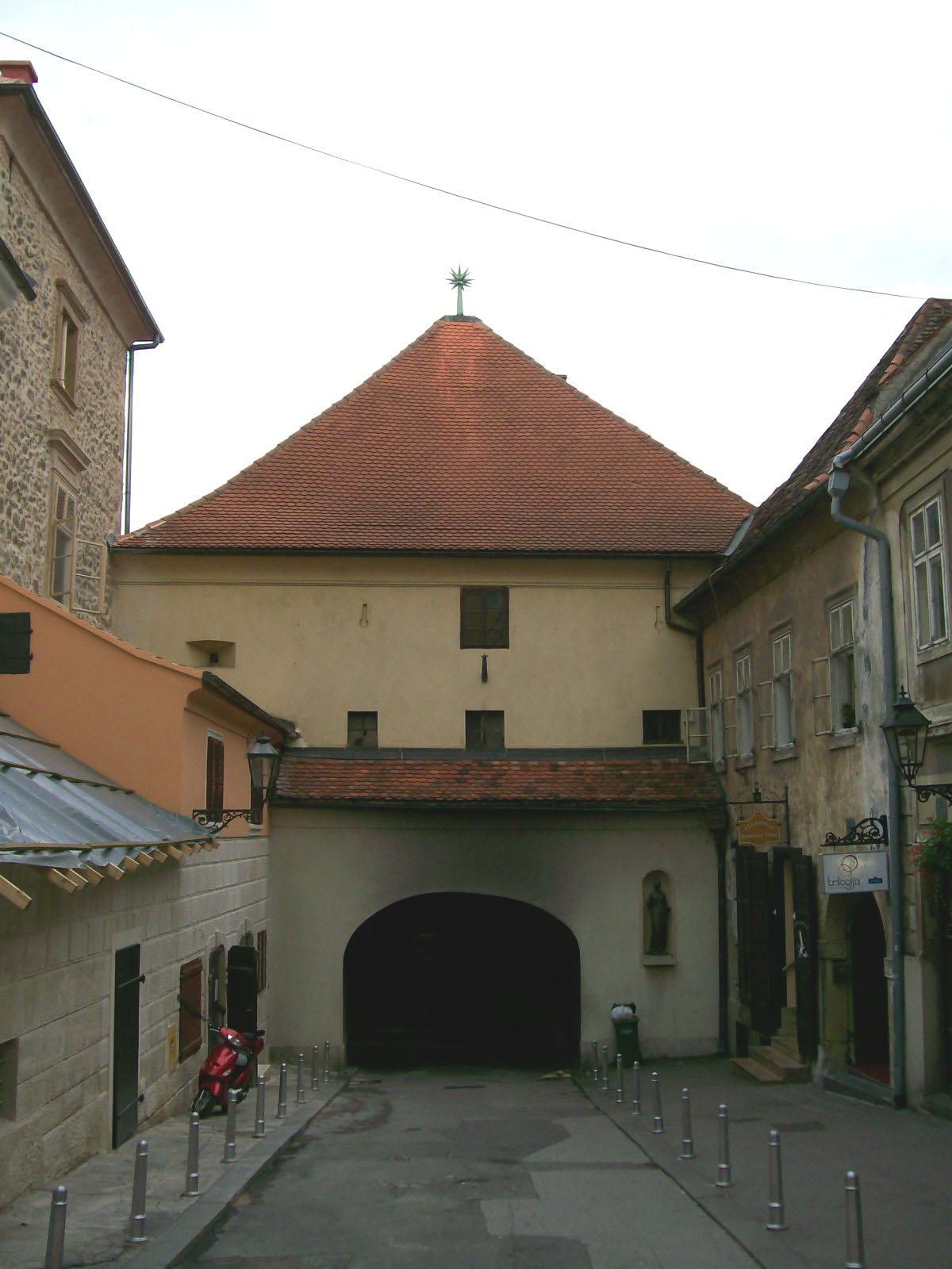 Kamenita vrata - ulaz s Gornjeg grada (Zagreb)